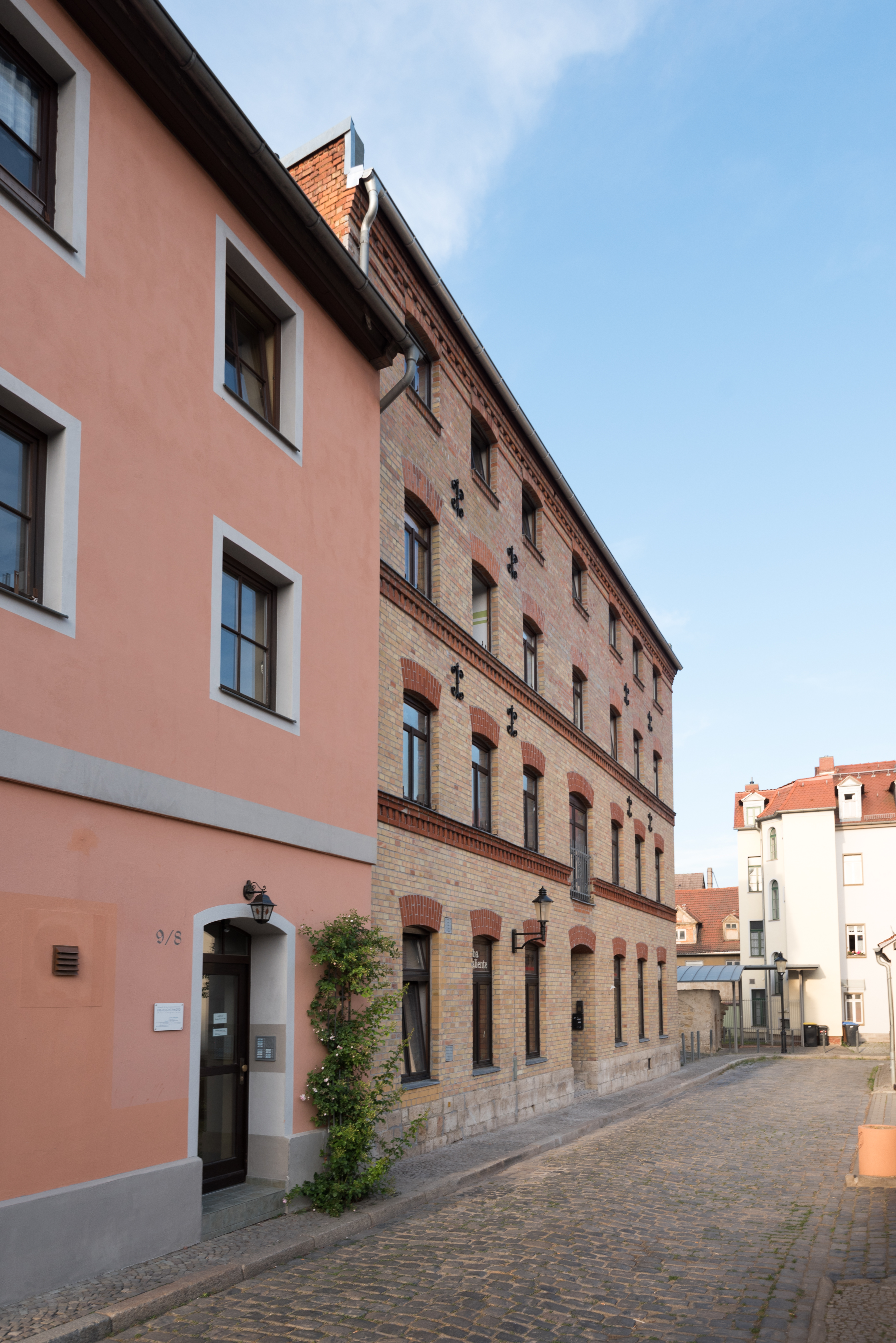 Naumburg (Saale), Rosengarten 8